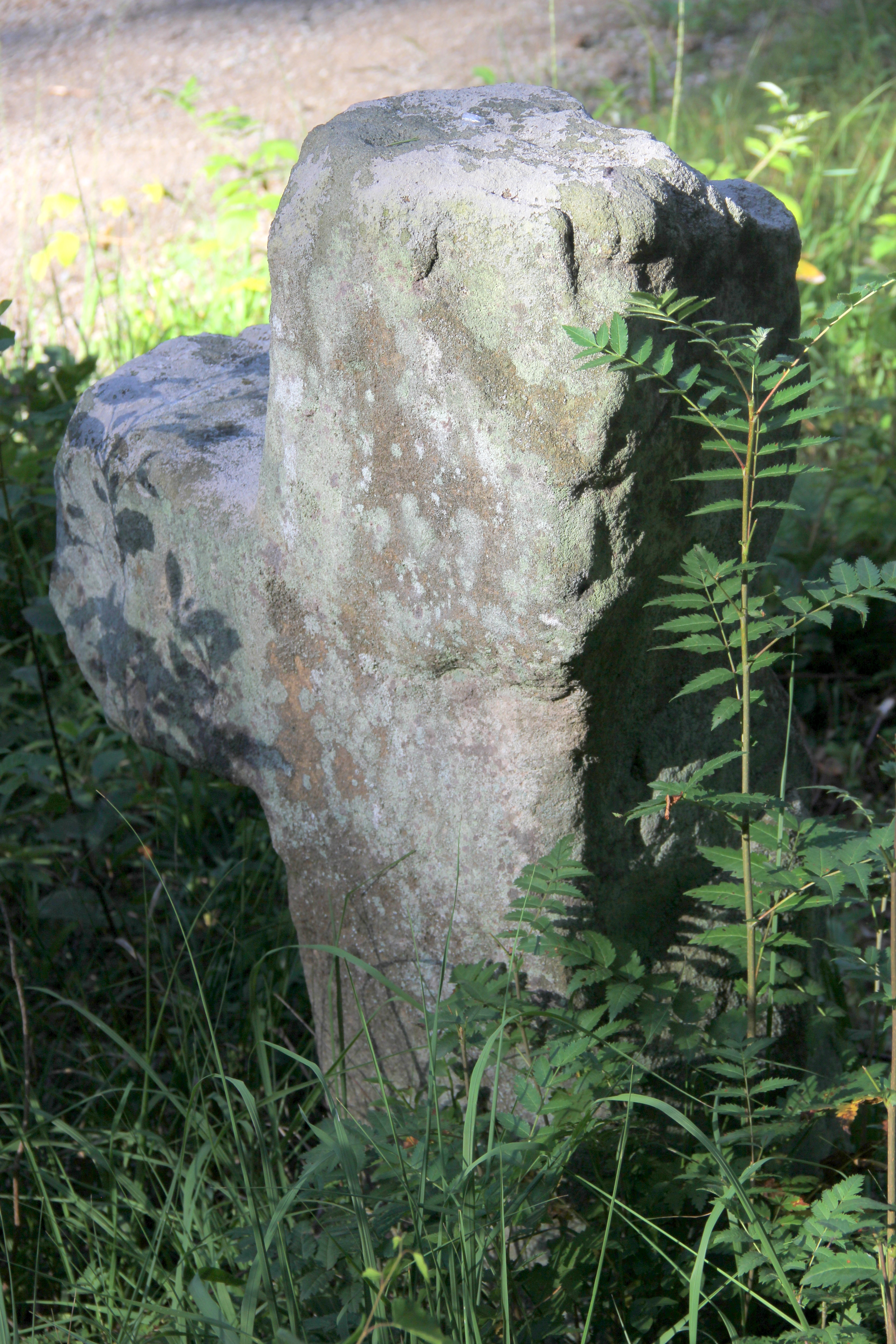 Steinkreuz